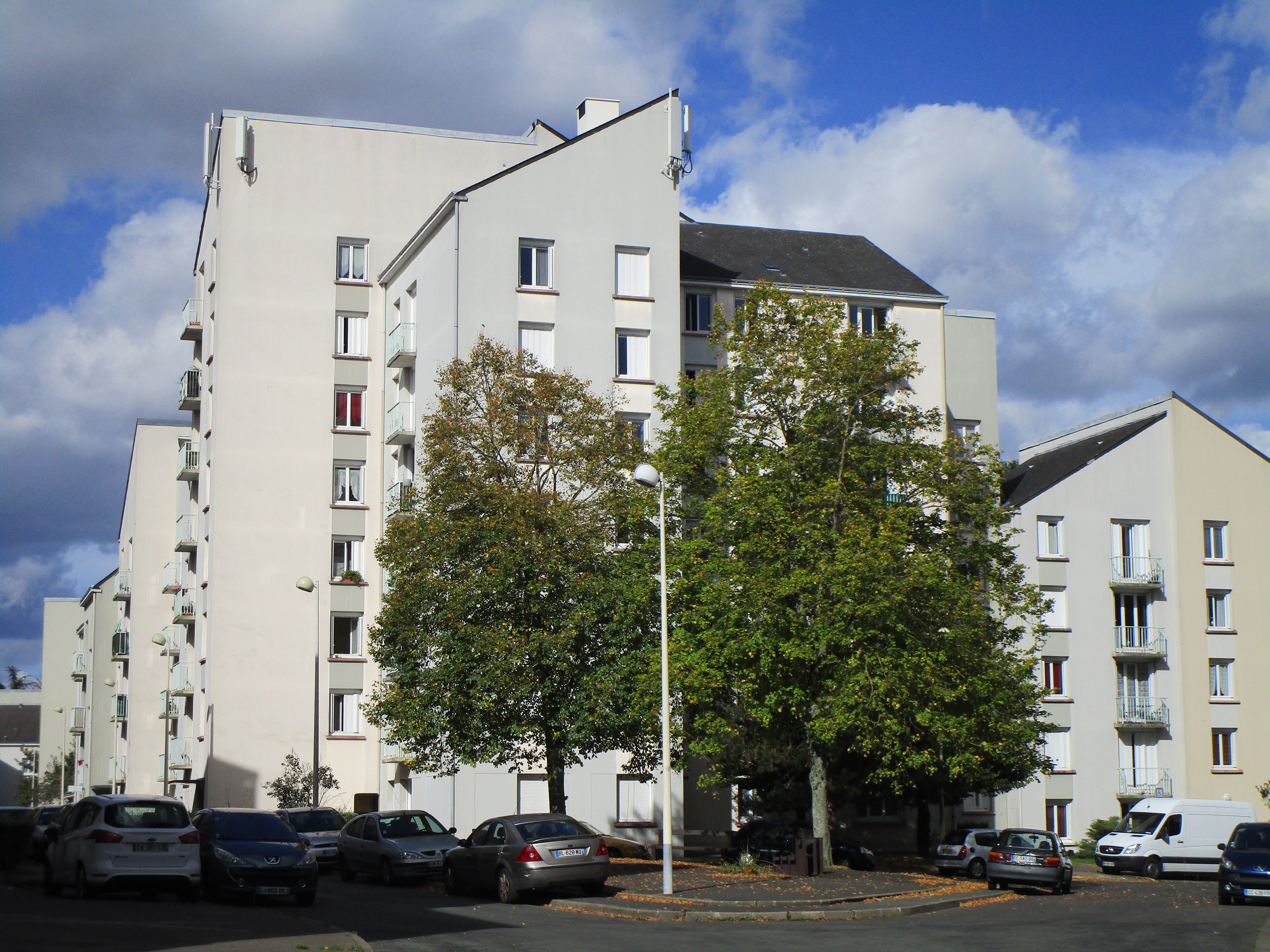 Immeubles sur la rue des Justices, dans le quartier de Sainte-Radegonde à Tours